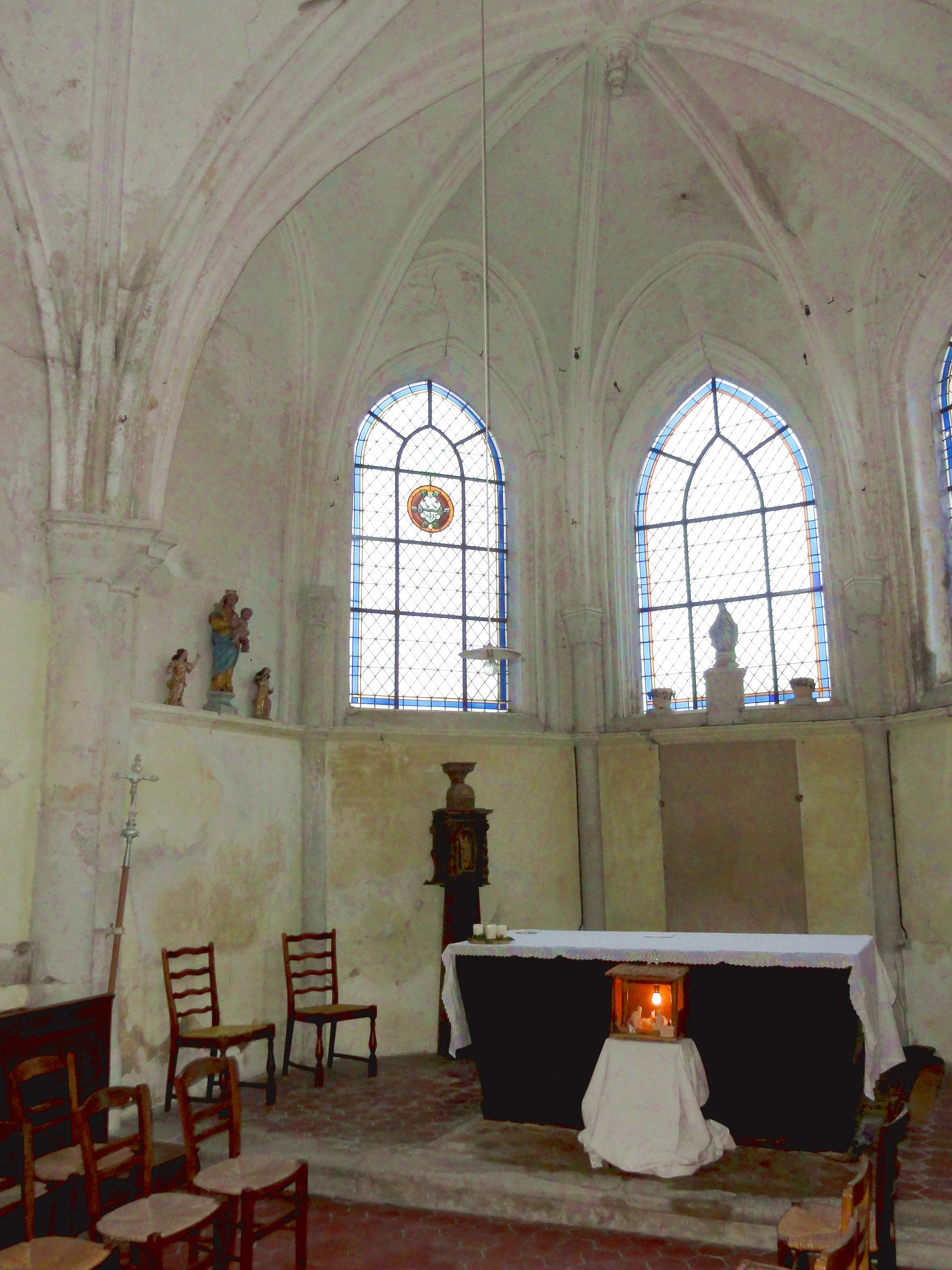 Intérieur de l'église - voir titre.